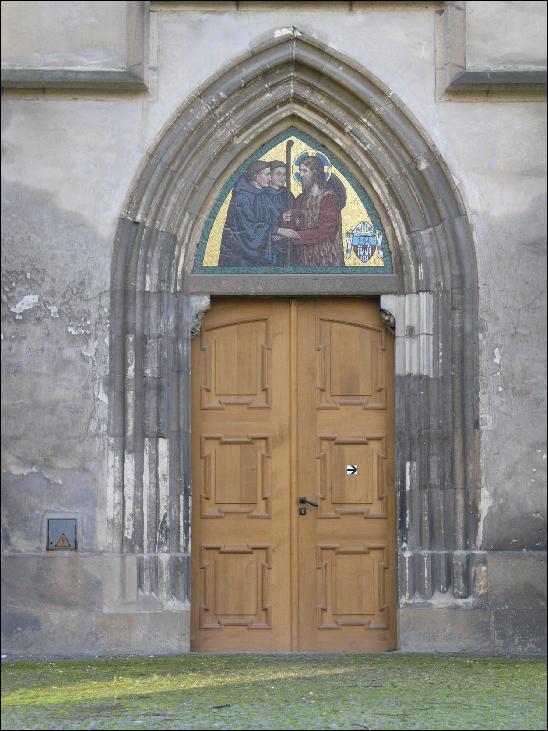 Praha, Nové Město - kostel Panny Marie na Slovanech